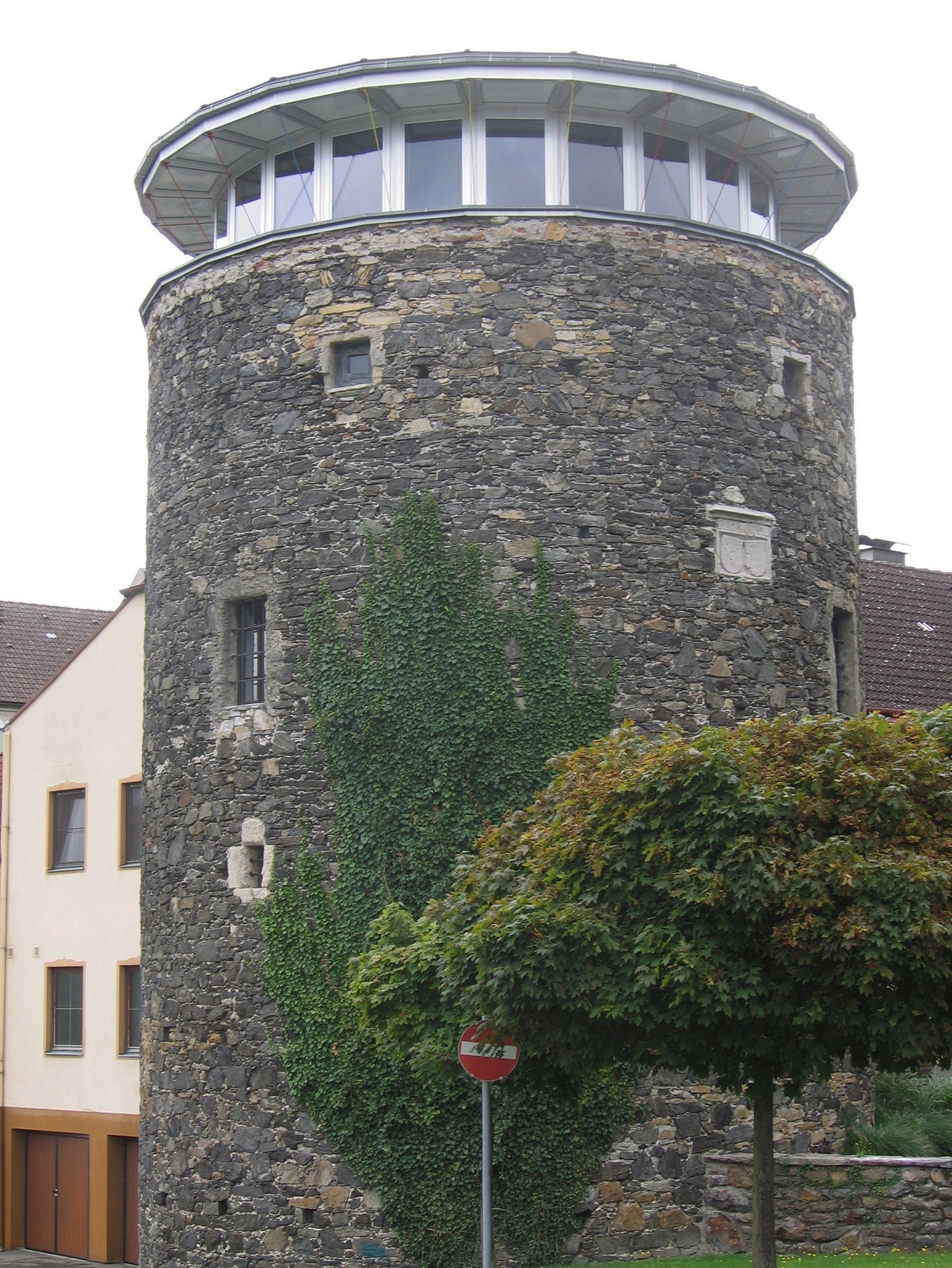 Pöchlarn, Austria, Welserturm